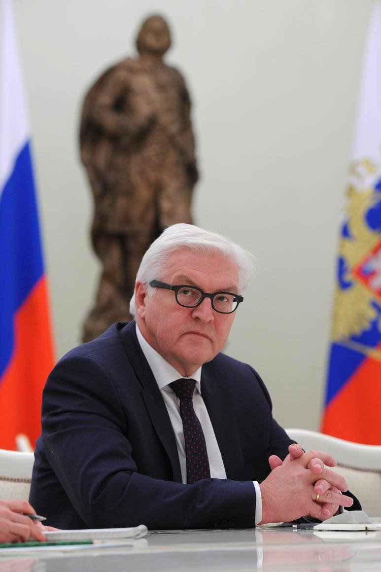 Министр иностранных дел Германии Франк-Вальтер Штайнмайер во время встречи с Президентом России Владимиром Путиным